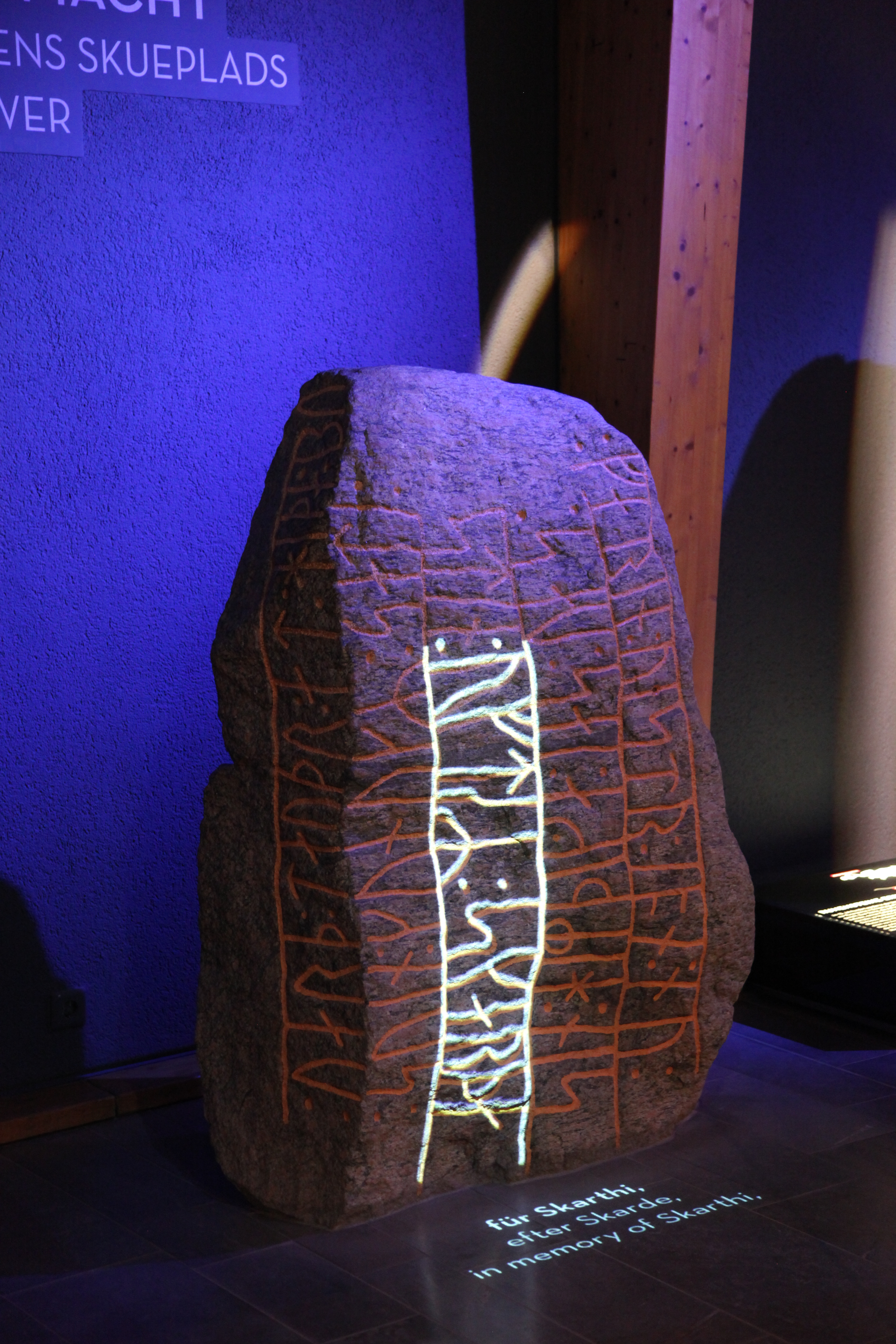 Wikinger Museum Haithabu, Am Haddebyer Noor 5 in Busdorf